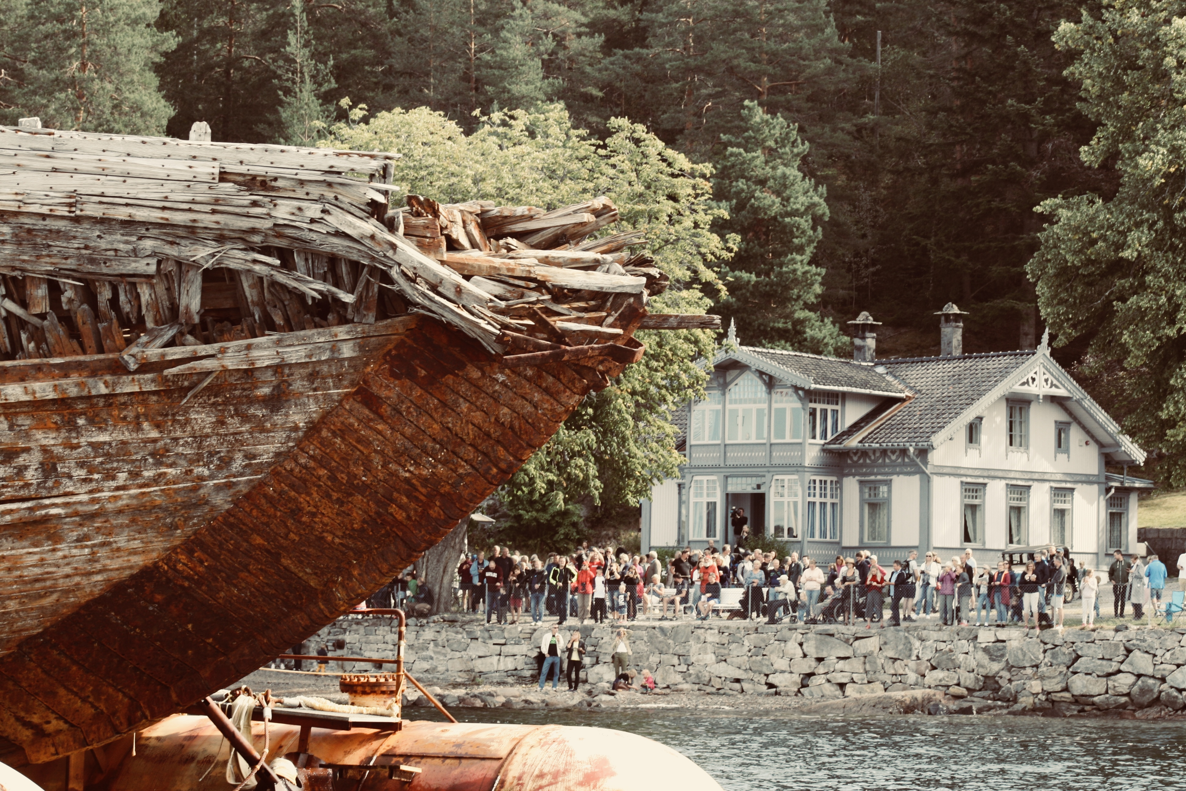 Maud på besøk for første og siste gang.